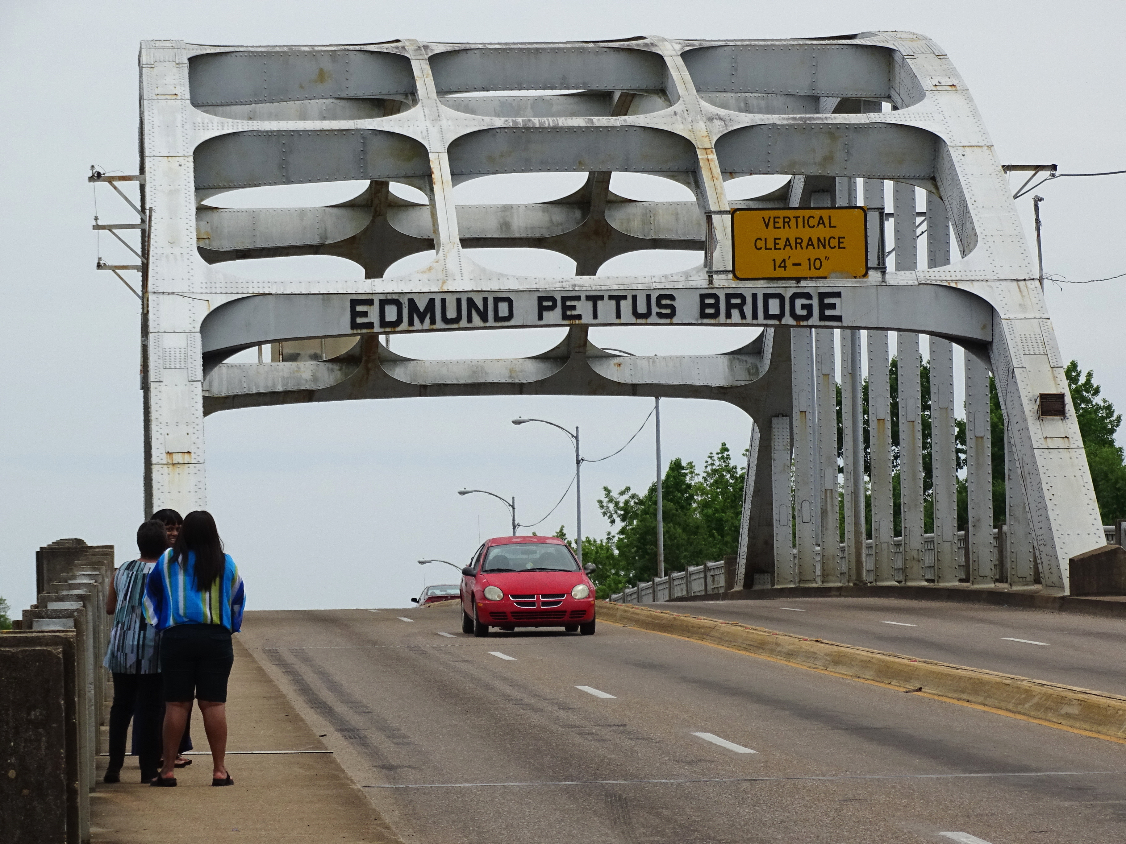 Edmund Pettus Bridge - Selma - Alabama - USA - 01